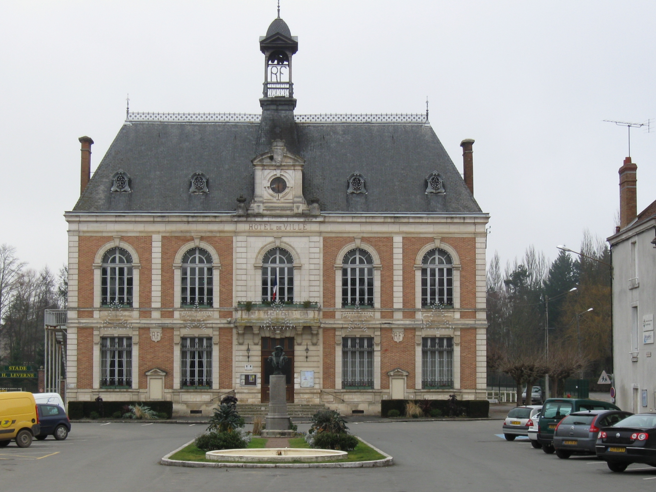 Châtillon-Coligny, la mairie.